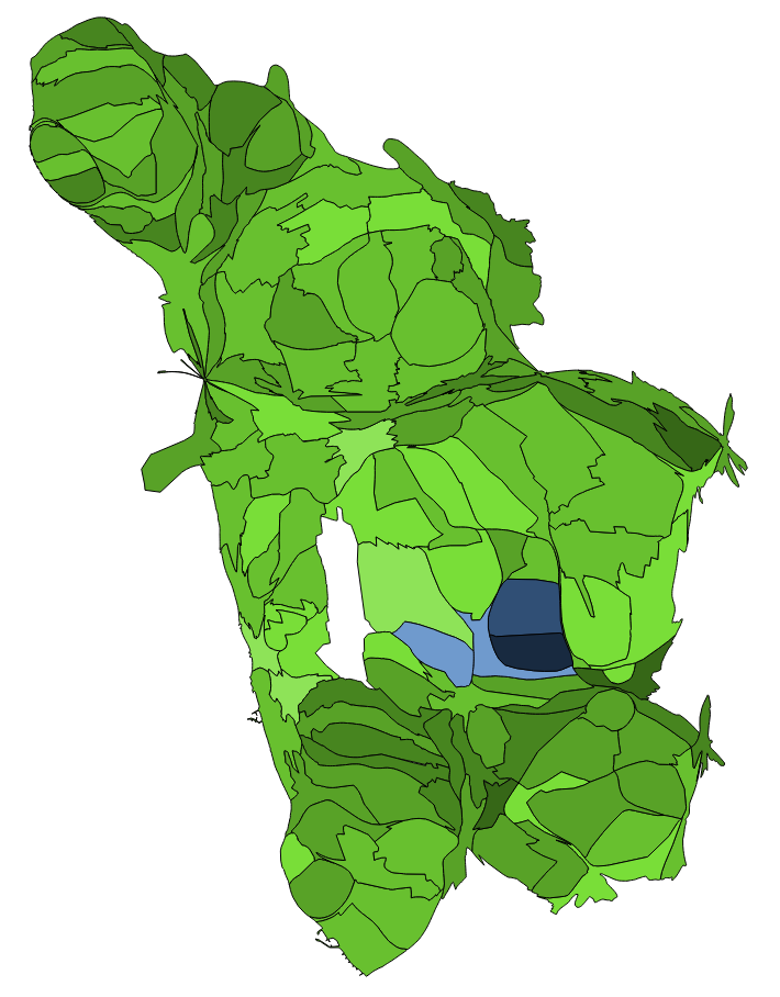 顏色對照表